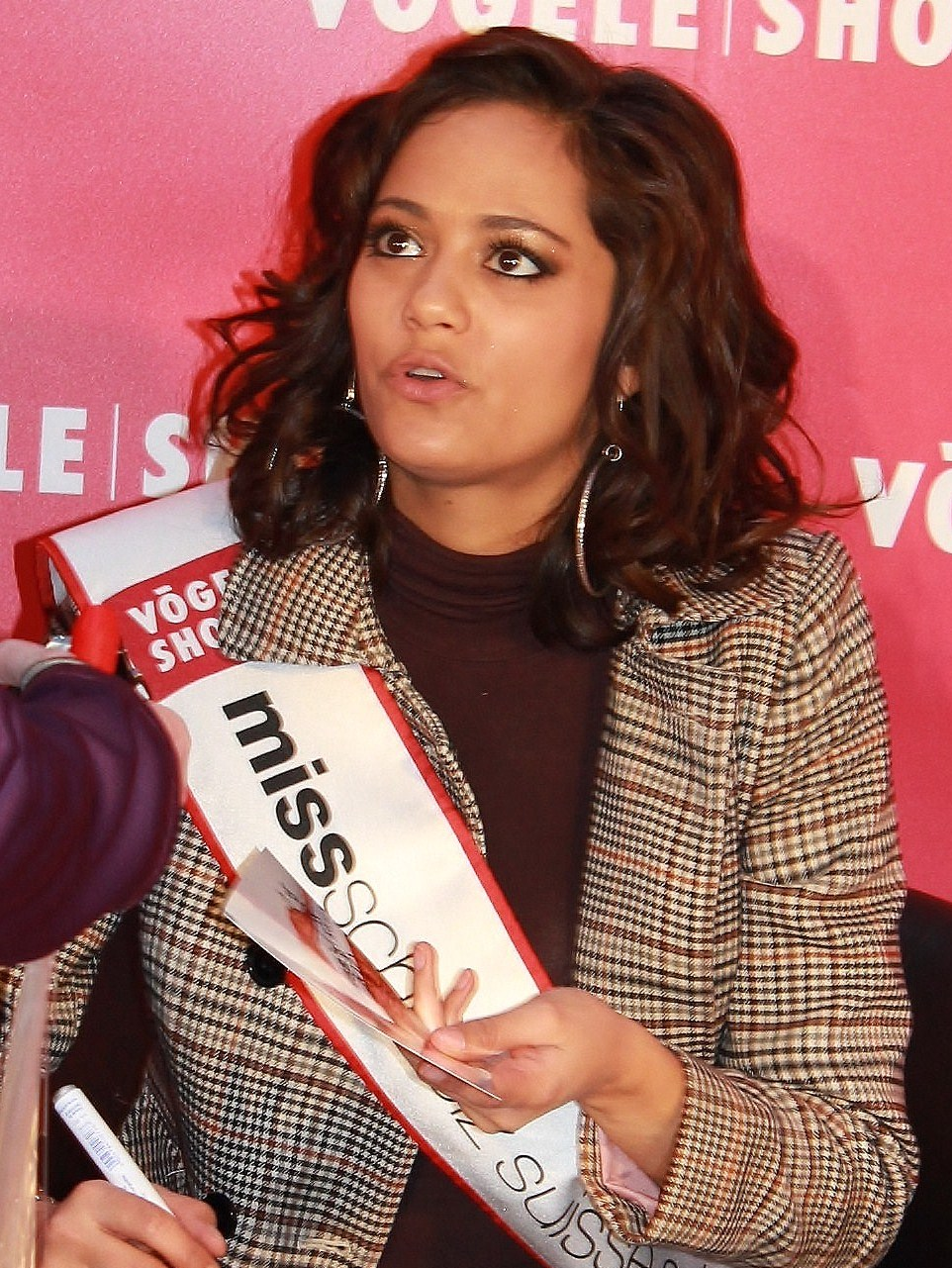 Alina Buchschacher (Miss Schweiz 2011) beim Signieren an einer Autogrammstunde.